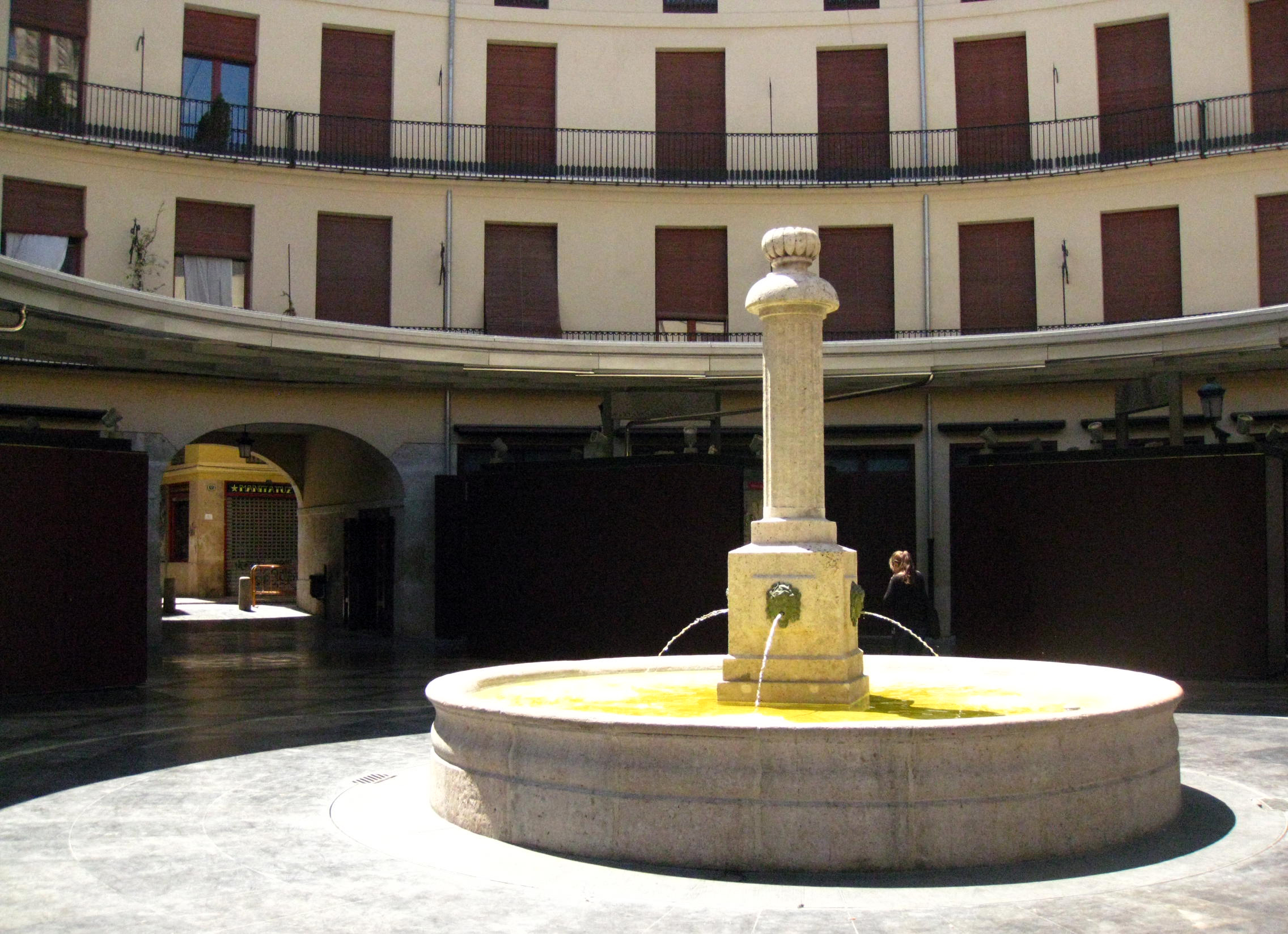 Plaça Redona (València) 15.250-127.